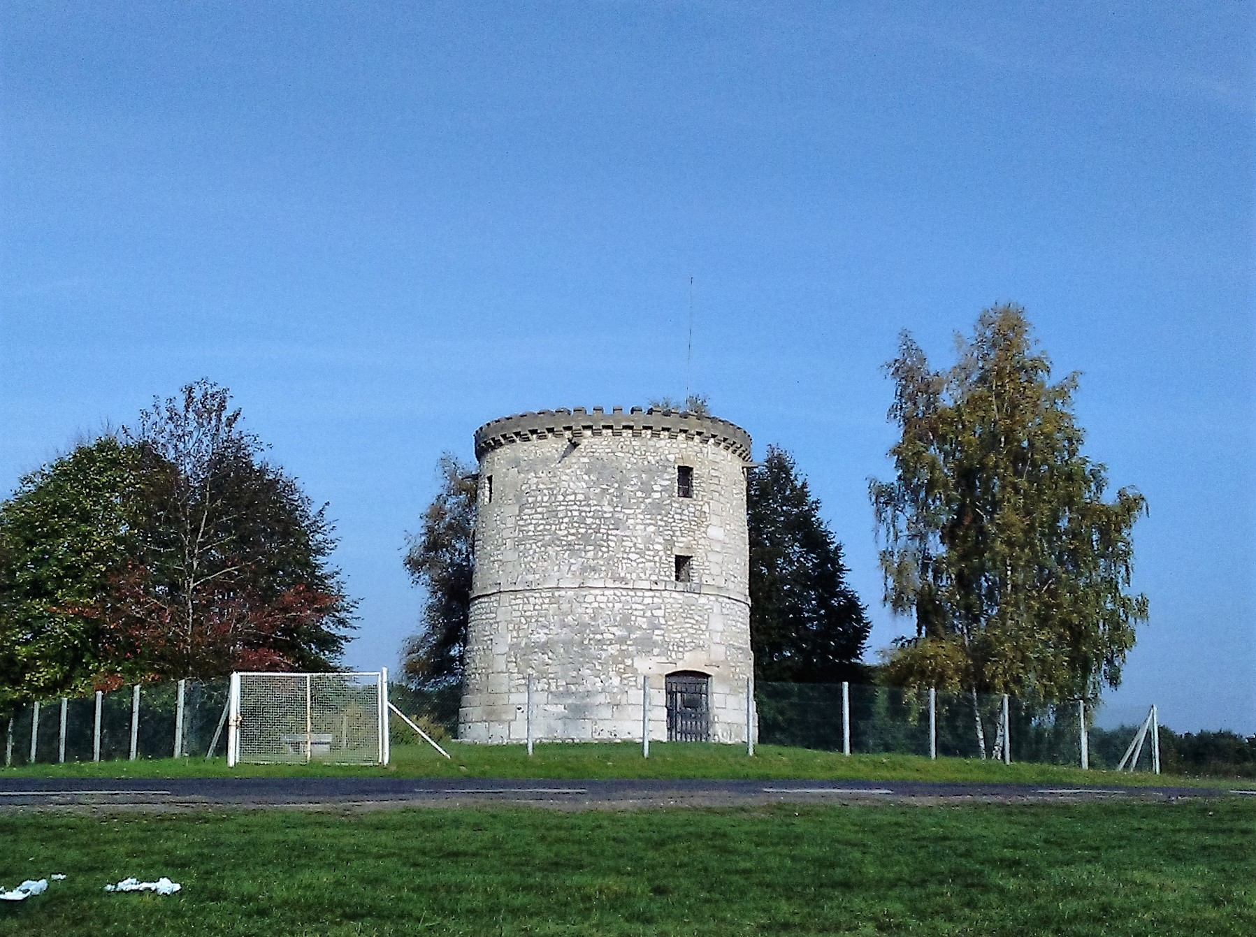 Tour de Tosny (Eure).